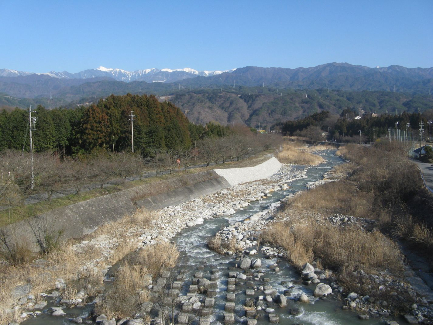 片桐松川 JR飯田線 伊那大島～上片桐間から西望